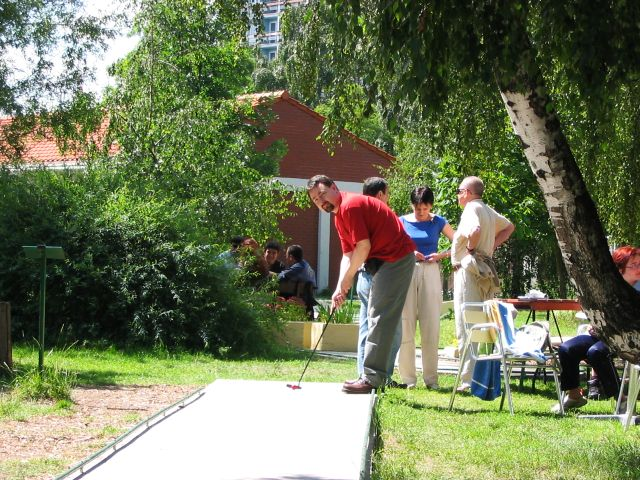 Minigolfista na zawodach - gracz w minigolfa